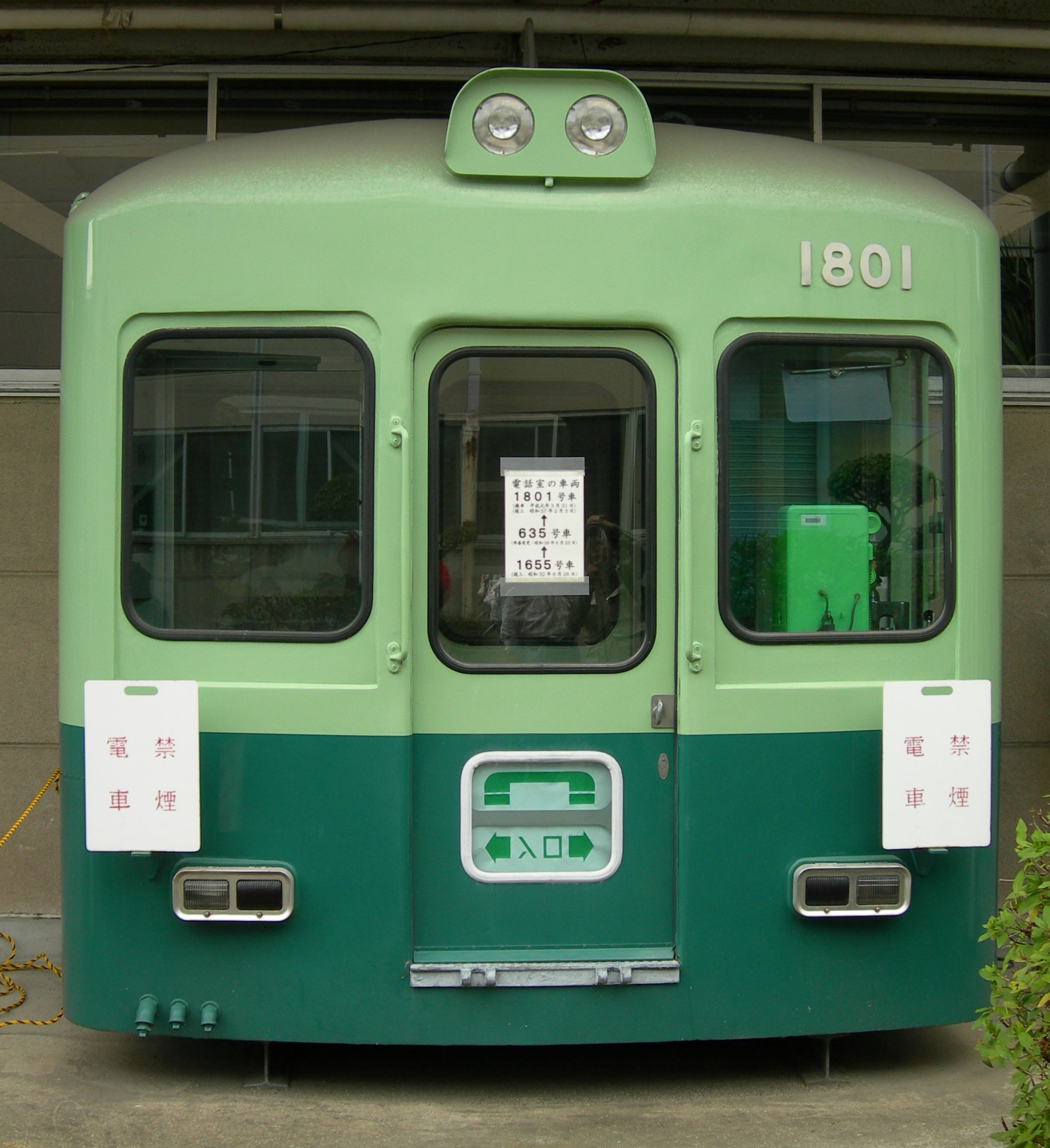 京阪1800系電車 (2代) 1801の前頭部カットボディ、寝屋川車両工場のマスコットかつ電話ボックス